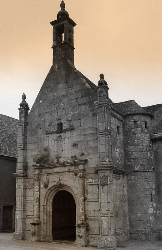 porche Sud église Guiclan (Finistère), denez goasguen